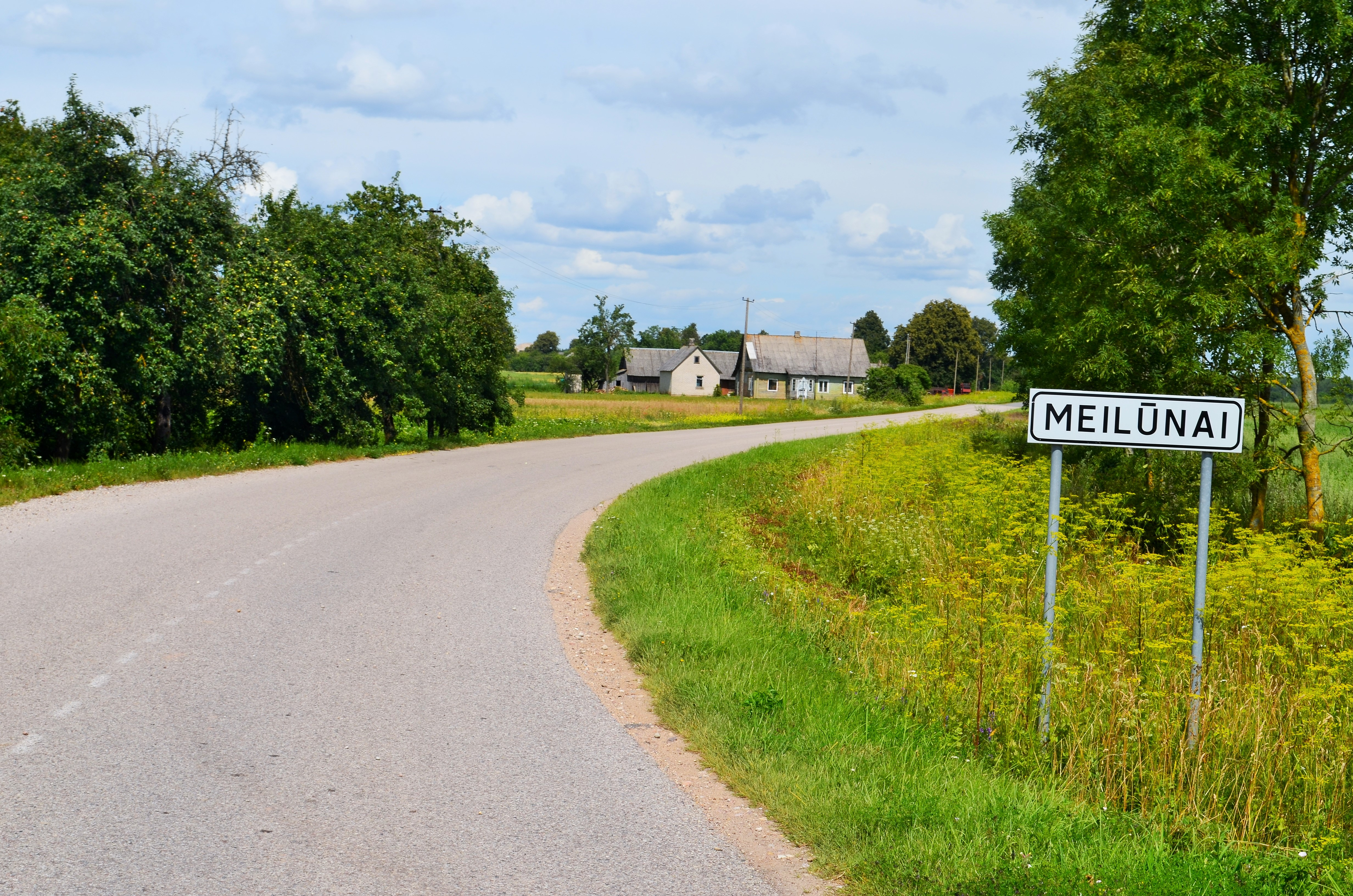 Meilūnai (Siesikų), Ukmergės raj.